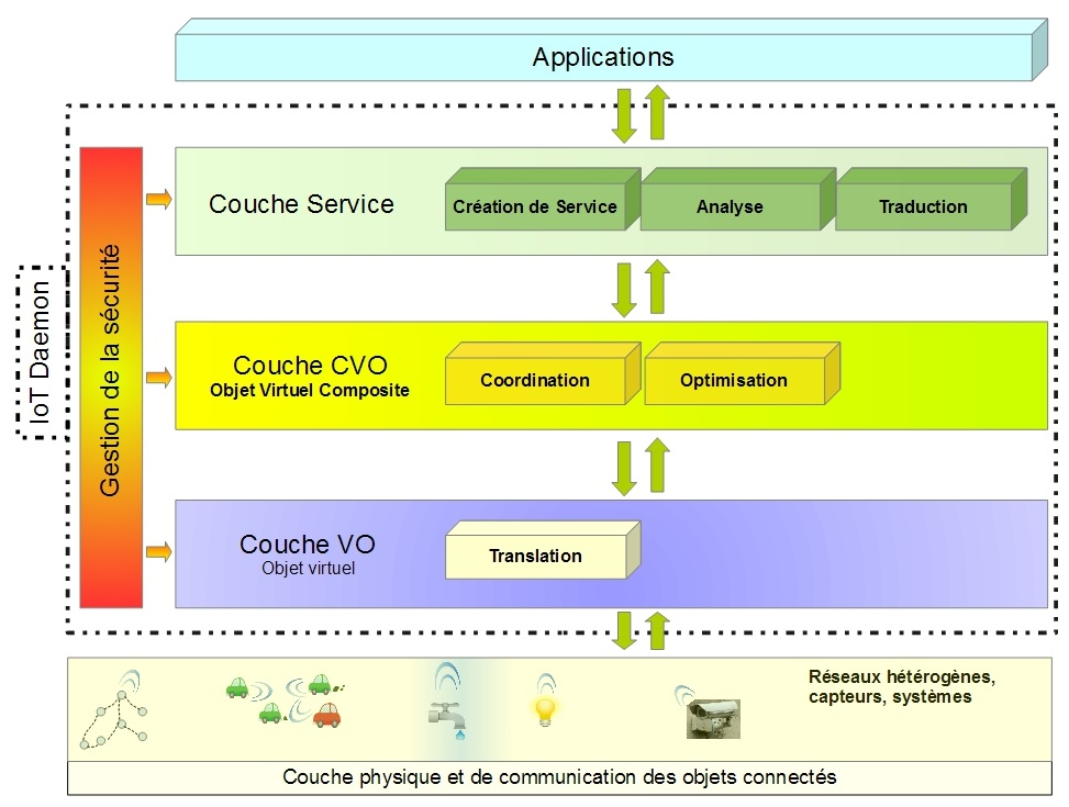 nouvelle version de l'image ( avec moins de bordure)